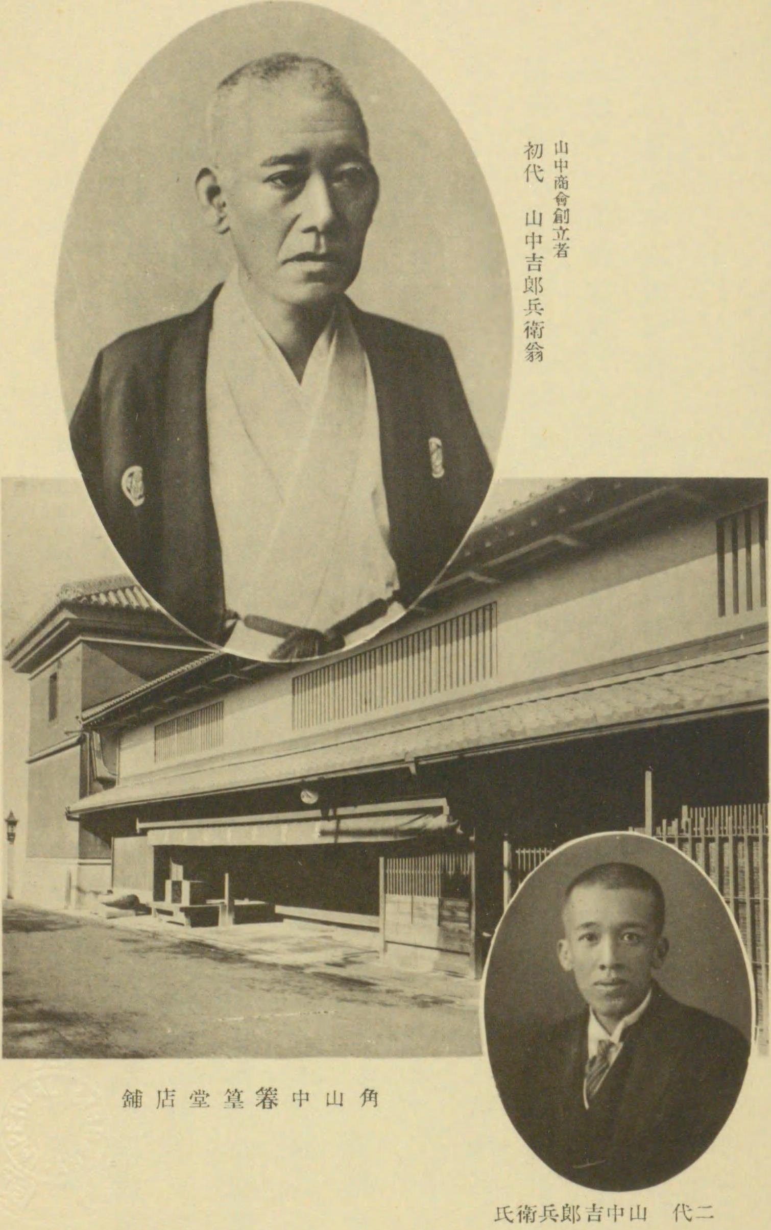 山中商会創立者 初代 山中吉郎兵衛 二代 山中吉郎兵衛 角山中箺篁堂店舗